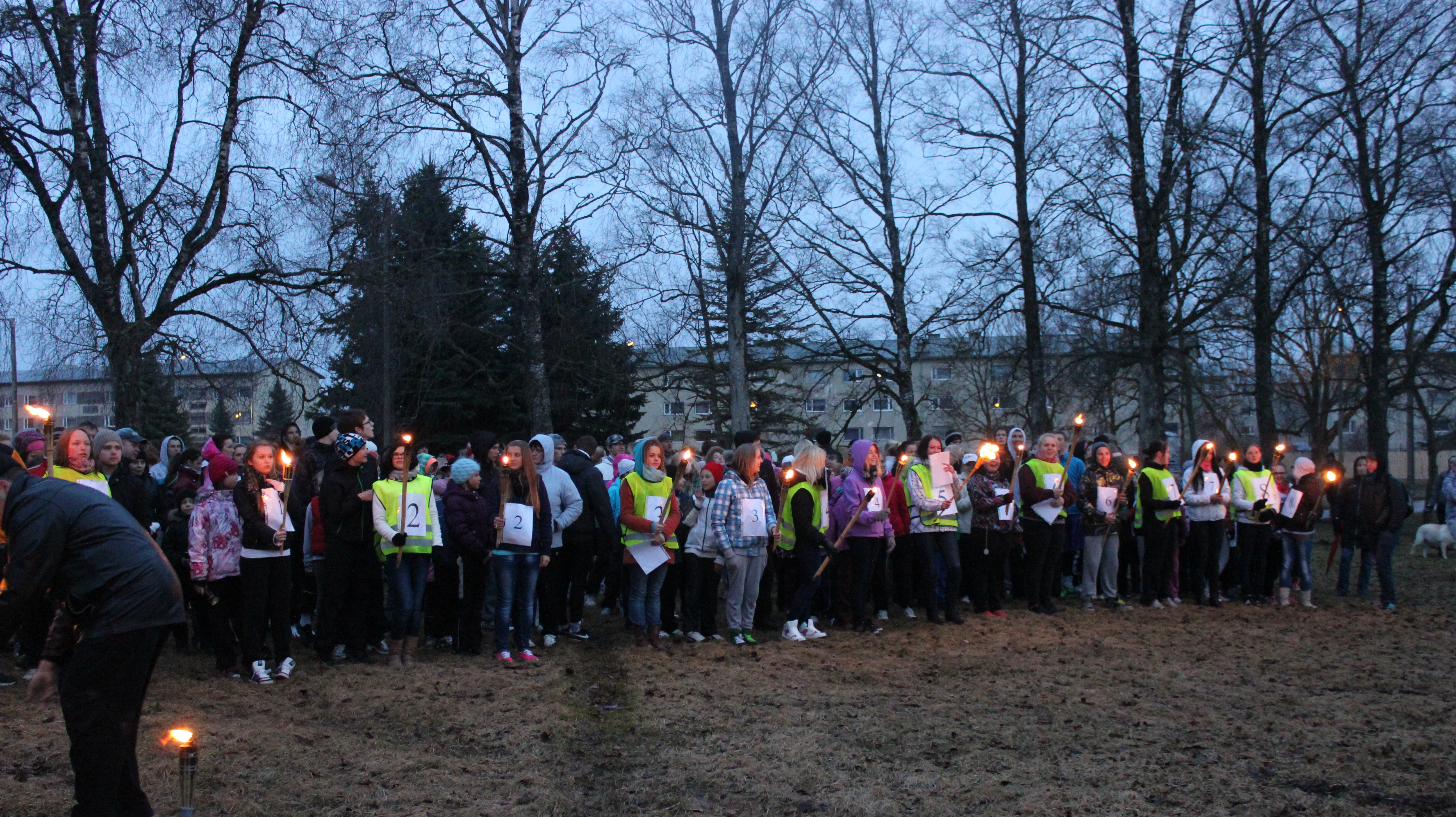 Jüriöö jooks Haljala kooli juures